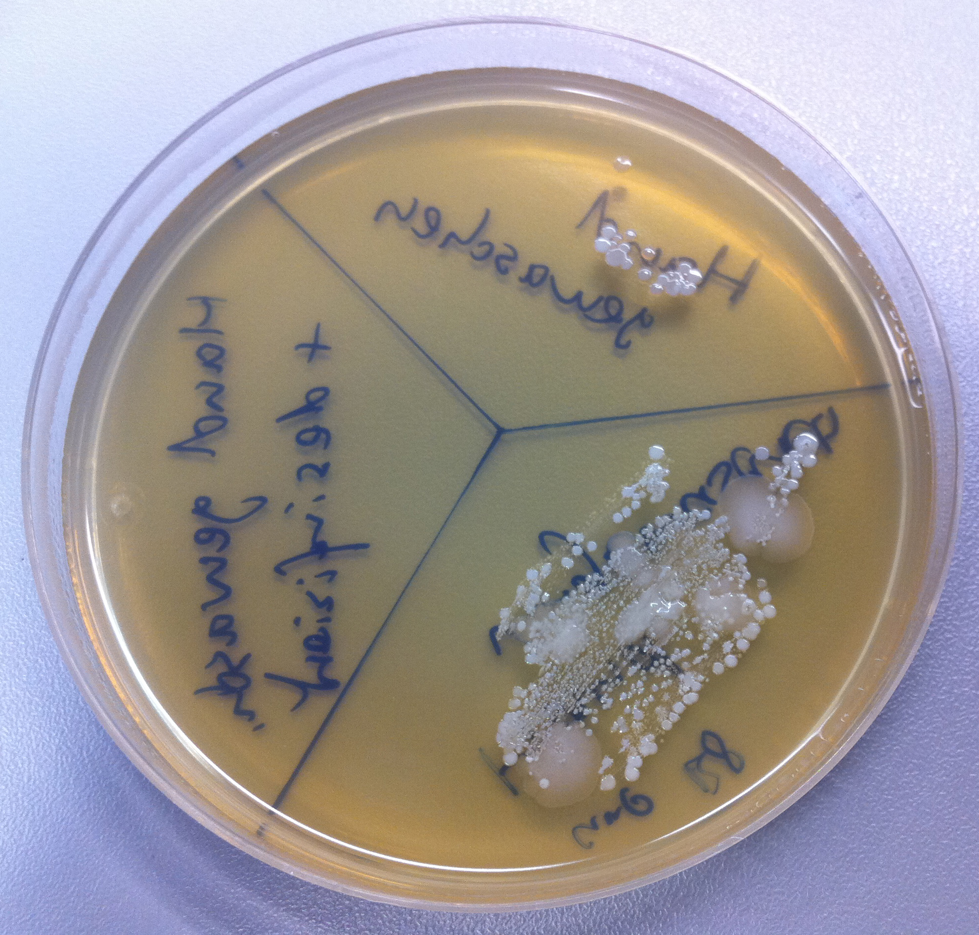 Abdruck (Abklatsch) der Hand auf einem Nährboden aus Hefe-Dextrose-Agar mit anschließender 24-Stündiger Inkubation bei 37 °C. Beschreibung aus 4-Uhr-Position gegen den Uhrzeigersinn: Abdruck eines ungewaschenen Fingers; Fingerabdruck der mit Warmwasser und Seife gewaschenen und anschließend getrockneten Hand; Fingerabdruck der mit Warmwasser und Seife gewaschenen und anschließend getrockneten Hand mit anschließender Händedesinfektion